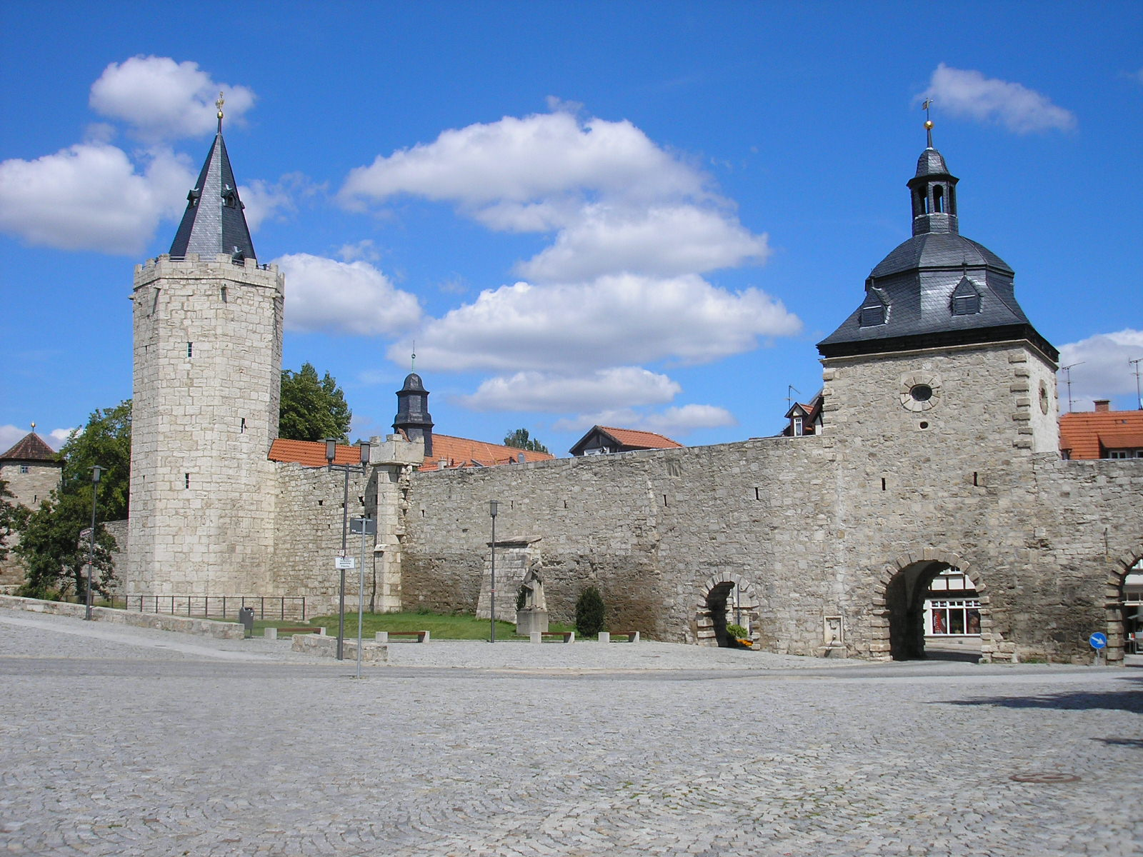 Blick vom Kleinen Blobach auf die Stadtmauer mit Innerem Frauentor und Rabenturm, Mühlhausen/Thüringen.